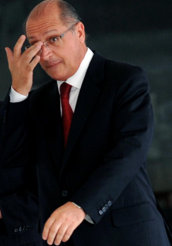 O governador de São Paulo,Geraldo Alckmin, fala com jornalistas após encontro com a presidenta Dilma Rousseff